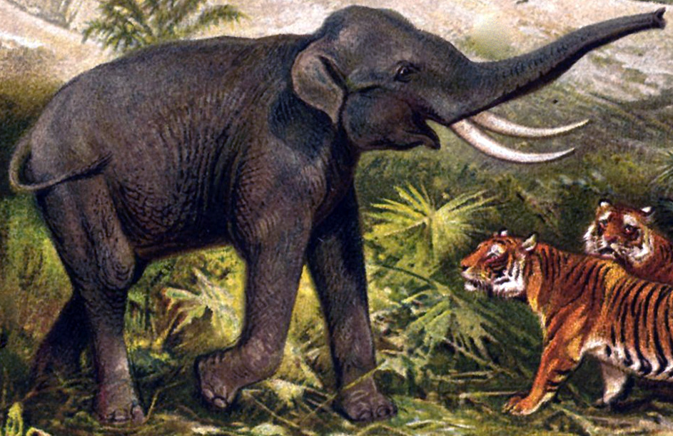 Indischer Elefant